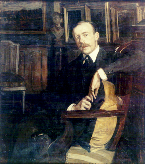 Portrait of Jacques-Émile Blanche